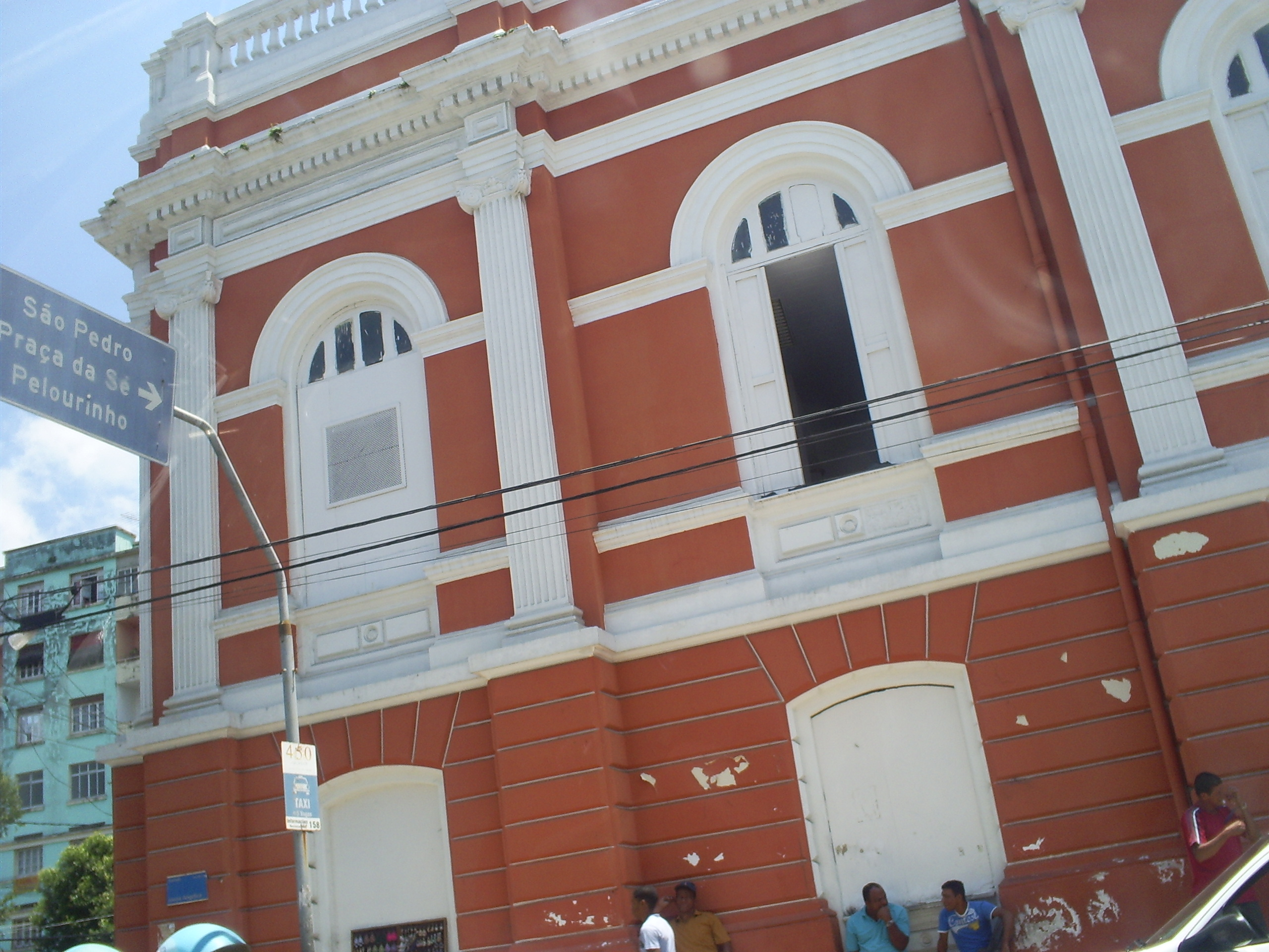 Foto do Instituto Histórico e Geográfico da Bahia, Salvador, Bahia, Brasil.